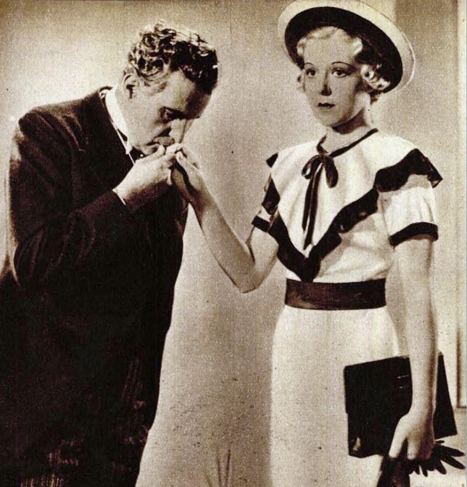 Somlay Artúr és Perczel Zita a Budai cukrászda című 1935-ös filmben